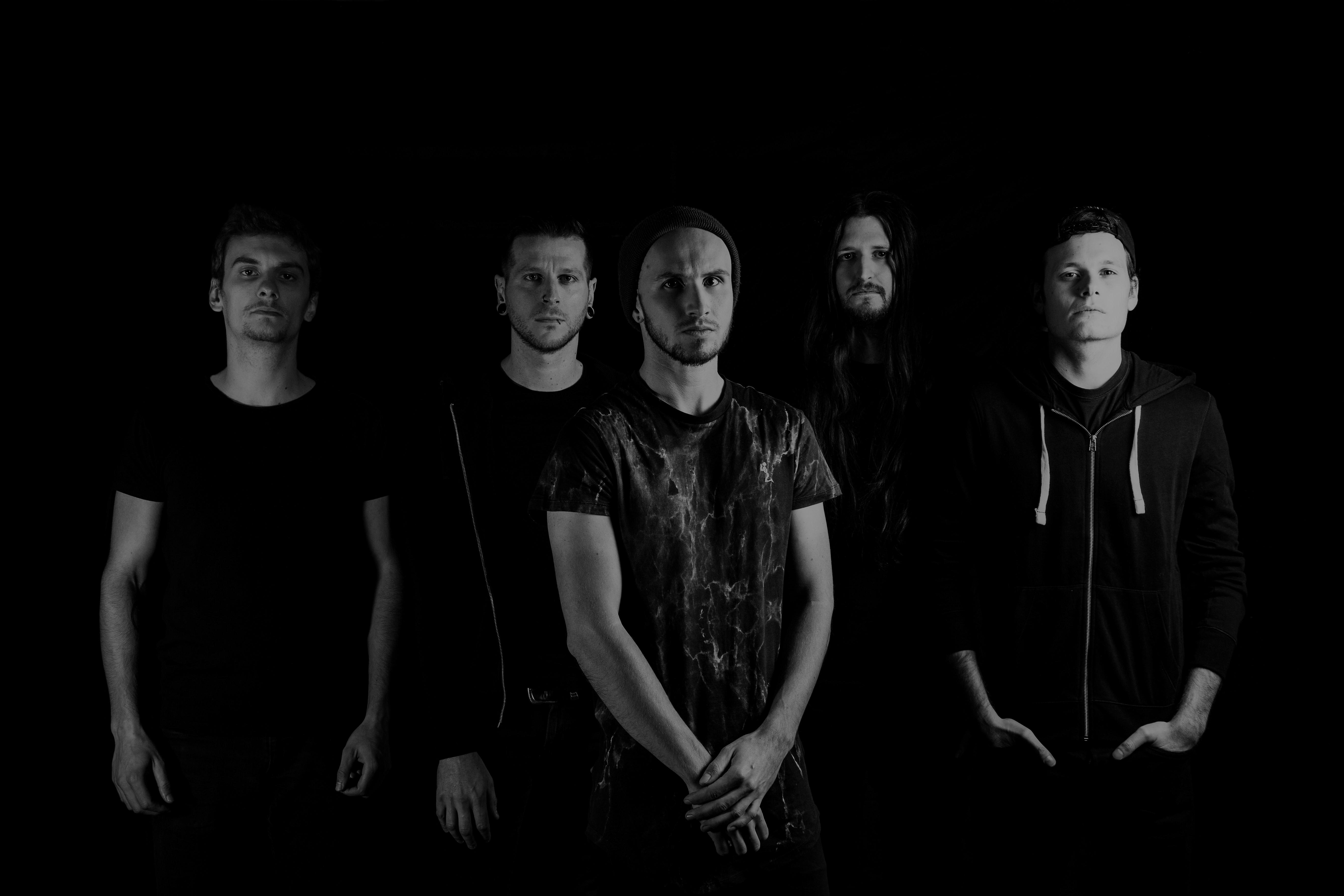 The Walking Dead Orchestra (de gauche à droite : Kevin Reymond, Cédric Cuilli, Florian Gatta, Jean-Baptiste Machon, Pierrick Debeaux)